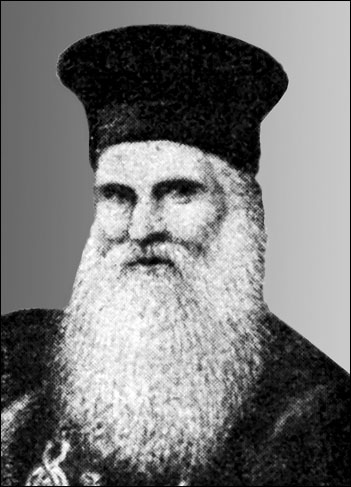 Далмации